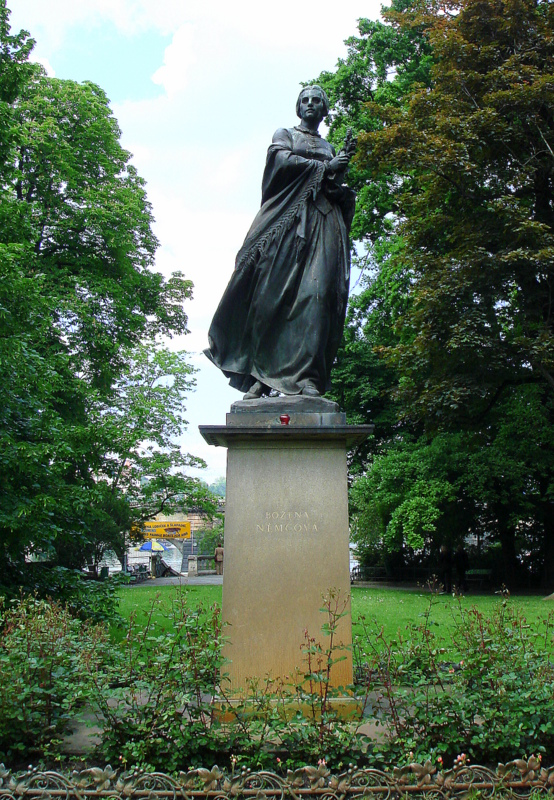 Pomník Boženy Němcové na Slovanském ostrově, Praha 1, Slovanský ostrov, Nové Město